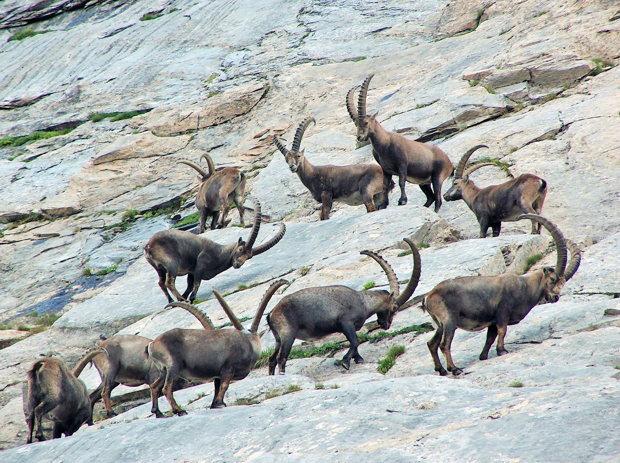 Parc national de la Vanoise, bouquetins juste au-dessus du lac des vaches